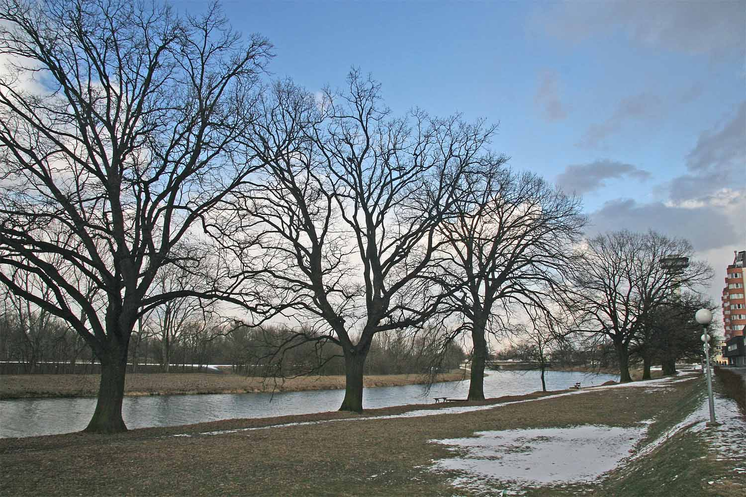 Skupina památných dubů letních u sídliště Závodu Míru v Pardubicích